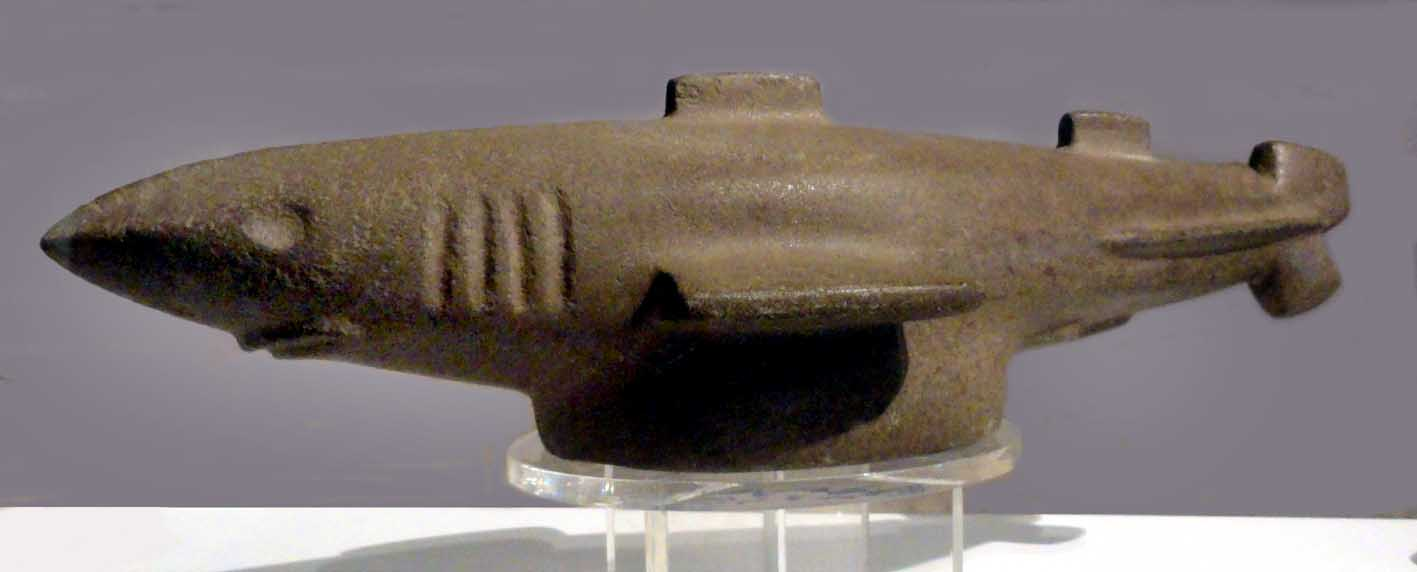 Zoólito em forma de tubarão, cultura Sambaqui(?). Museu da UFRGS.